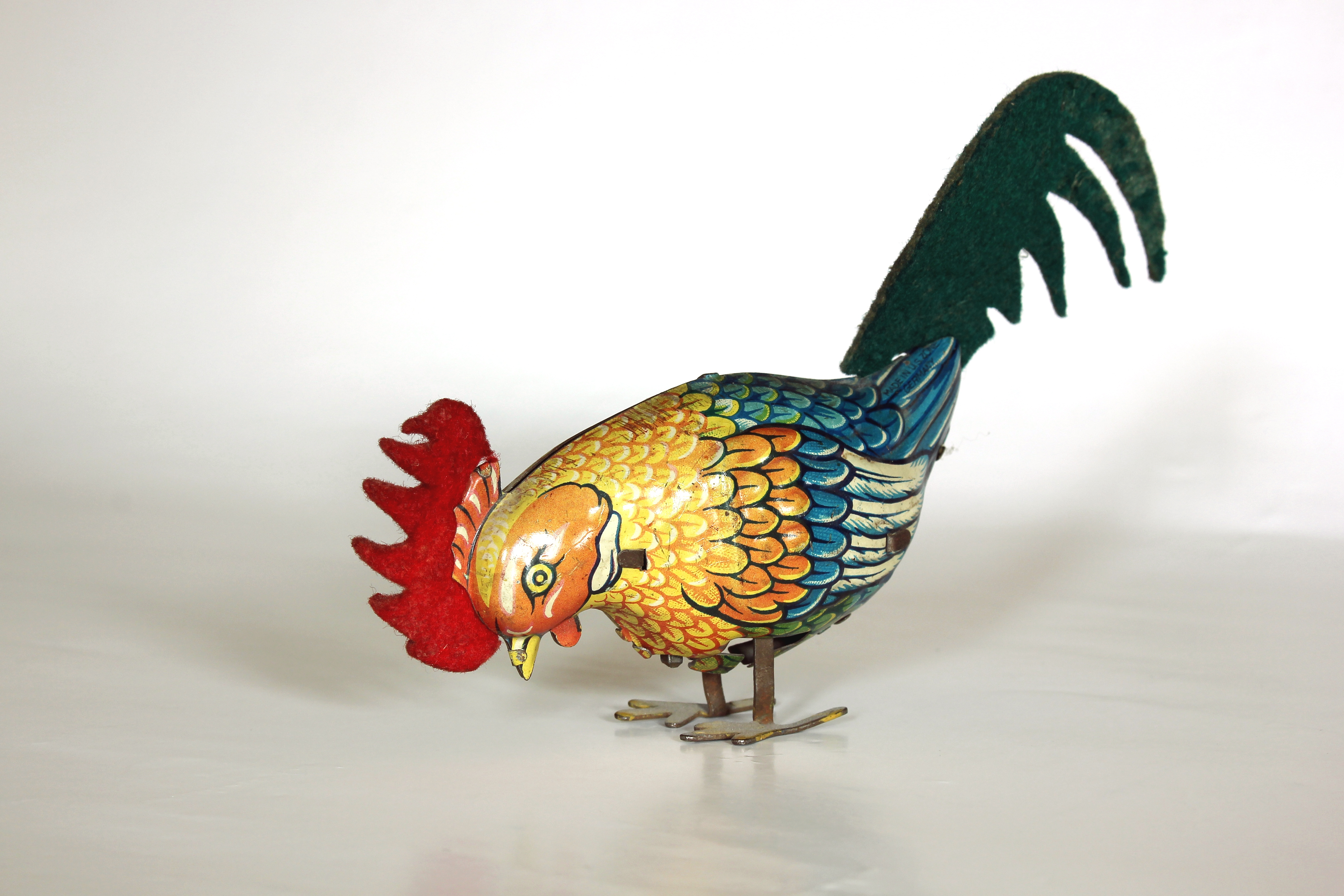 Blechspielzeug-Hahn mit Uhrwerk, bewegt sich fort und pickt, um 1948, Hersteller: GKN Georg Köhler Nürnberg